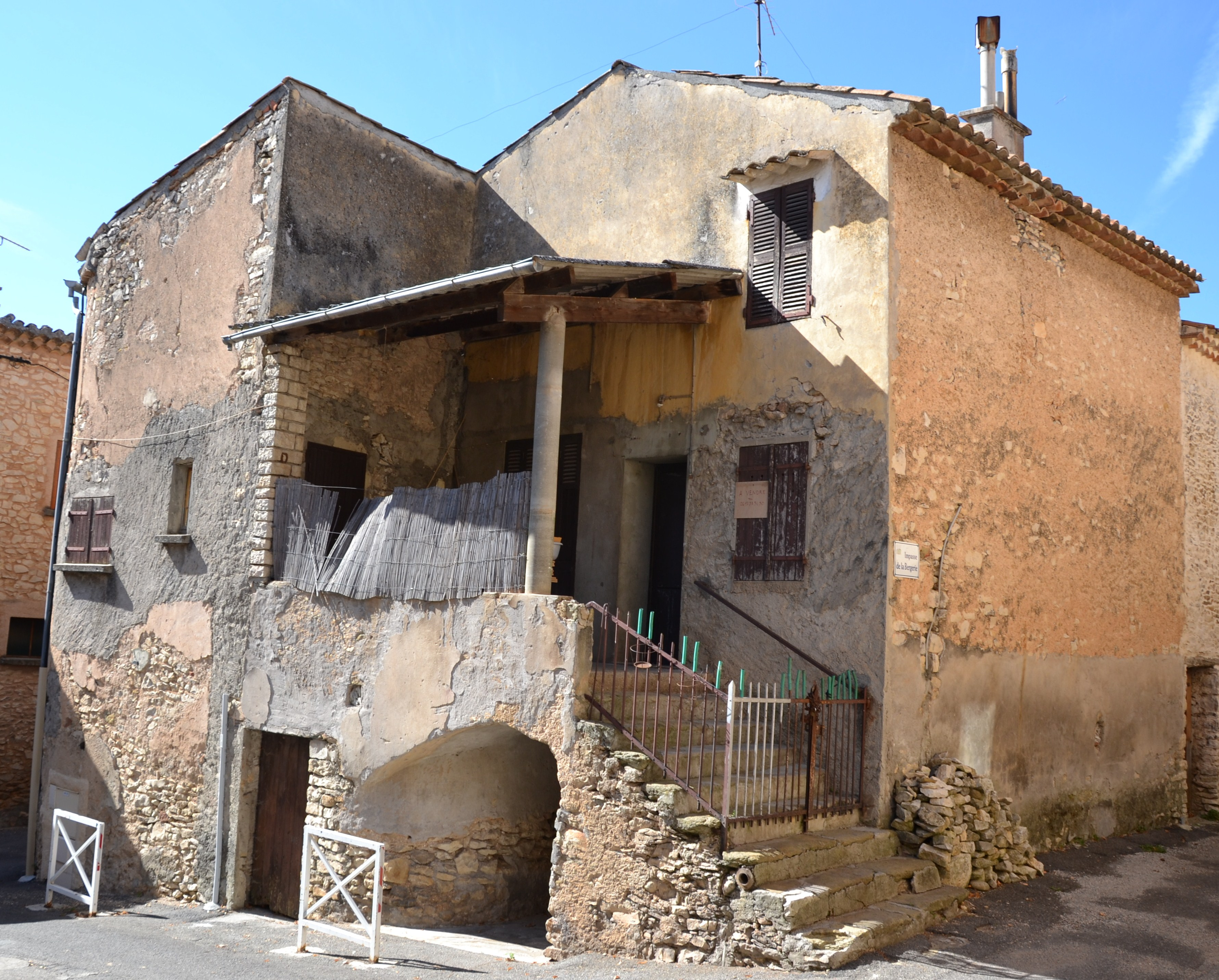 maison en hauteur à Mallefougasse-Augès